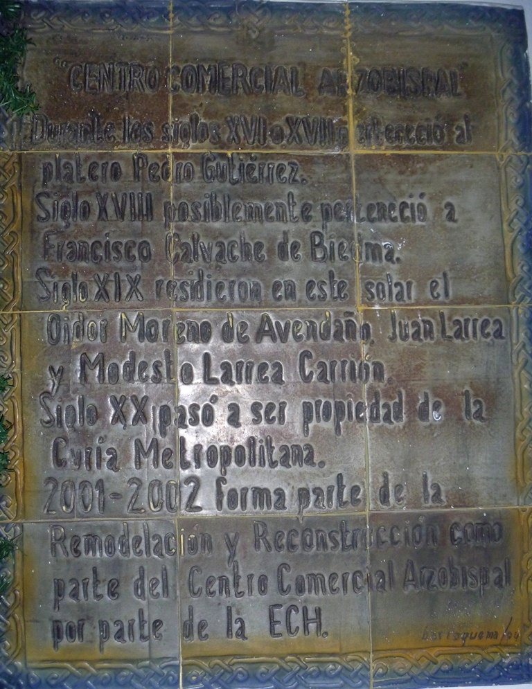 Placa en el Palacio de la Curia Metropolitana, actual Centro Comercial Pasaje Arzobispal. Quito, Ecuador. Describe la historia del edificio.